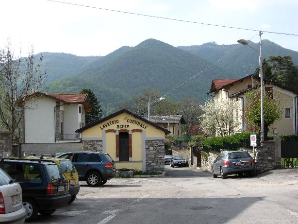 Lanzo d’Intelvi - Il lavatoio